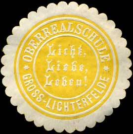 Sealing stamp Title: Oberrealschule - Gross-Lichterfelde Description: Licht, Liebe, Leben, gelb, weiß, geprägt Place: Groß Lichterfelde size: 4 cm